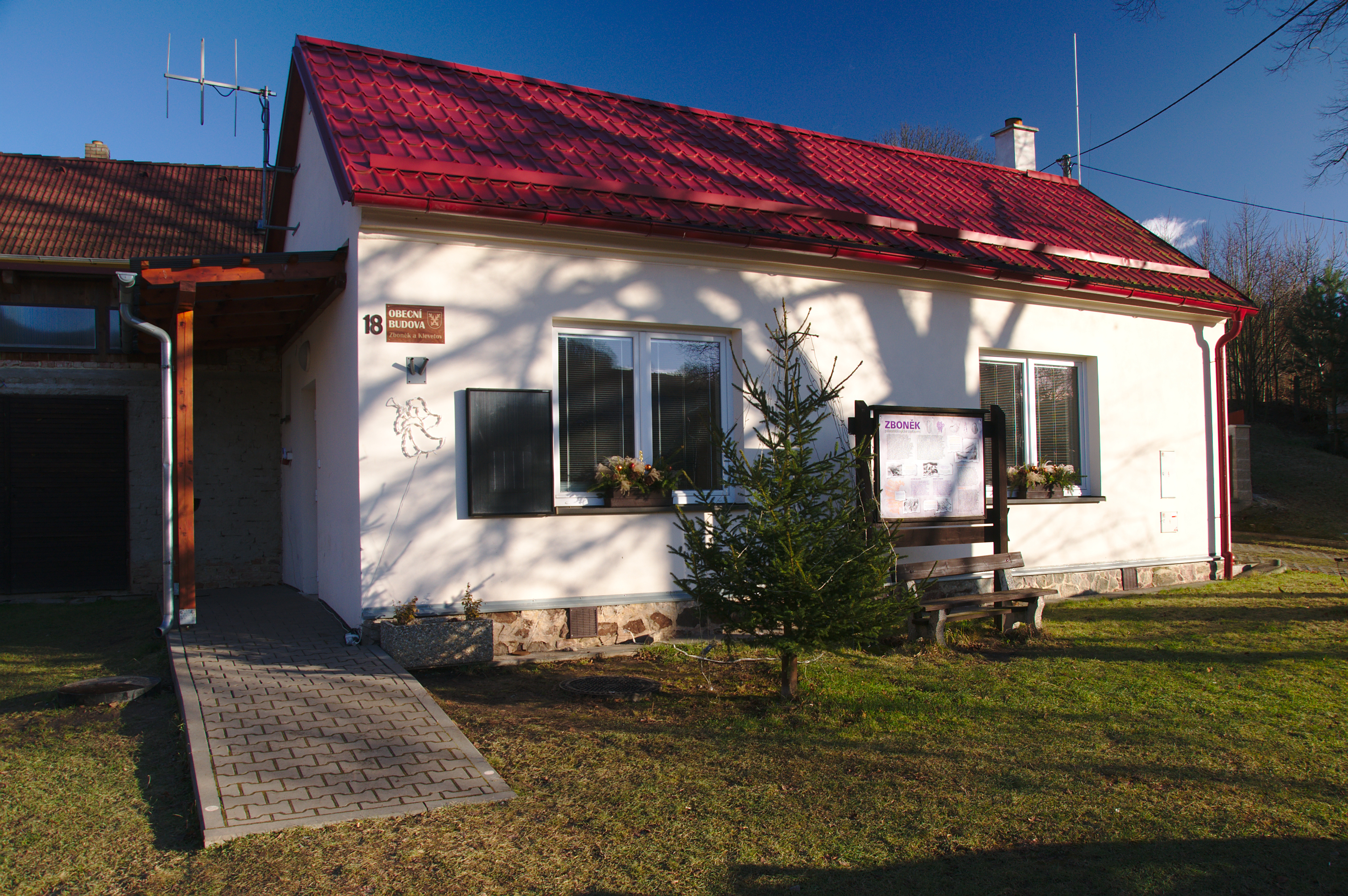 Obecní budova pro místní části Zboněk a Klevetov, Letovice, okres Blansko